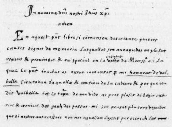 Debut de la Chornique Histoire Jounaliere en occitan d'Honorat de Valbela